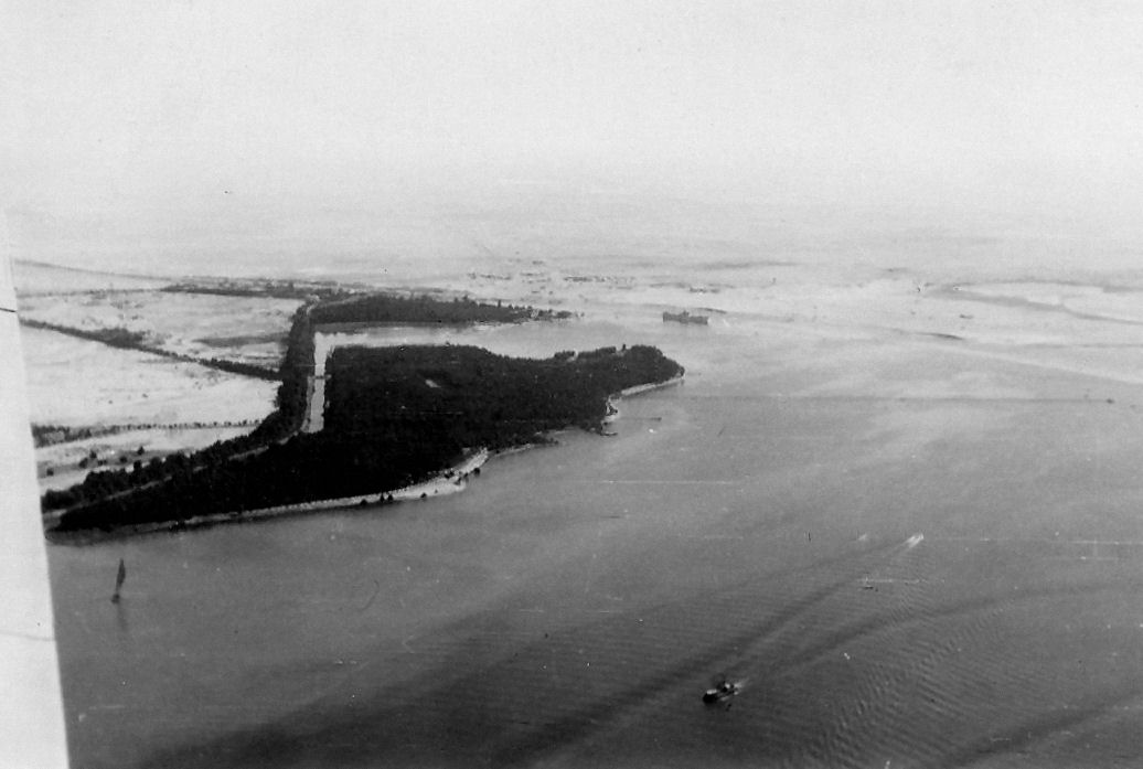 Suez, Sweetwater Canals entering Lake Timsah